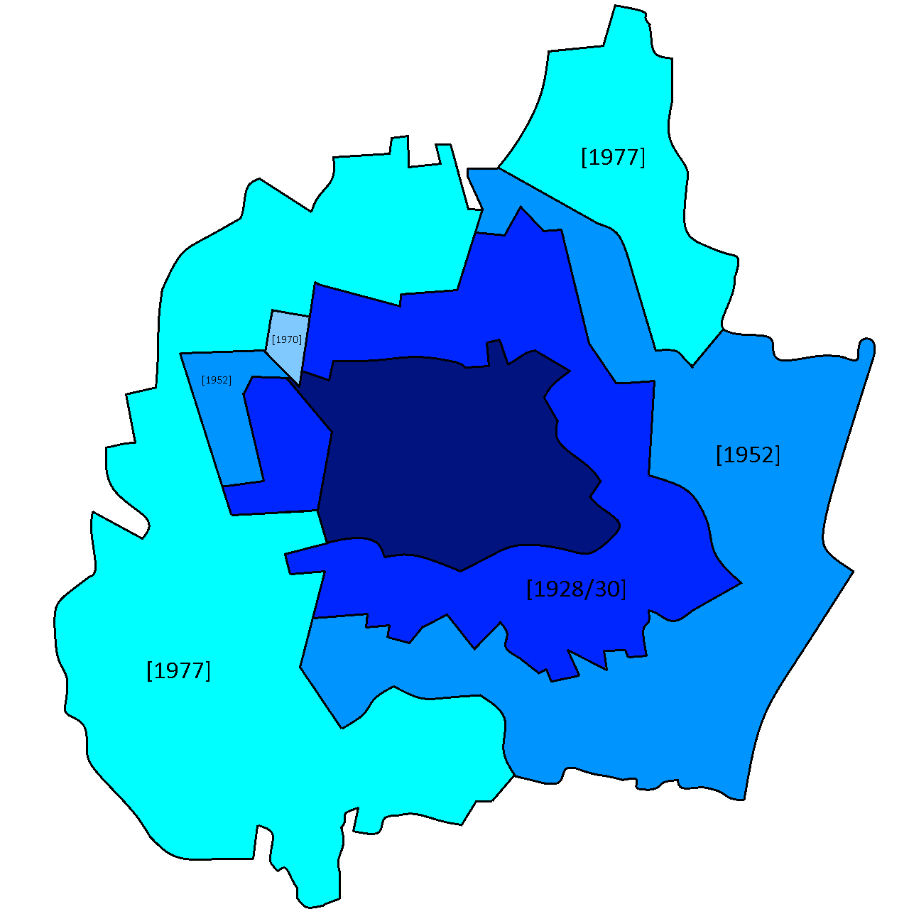 Rozwój terytorialny Częstochowy w XX wieku. Opracowano na podstawie materiałów źródłowych ze strony Częstochowa wczoraj i dziś. Granice są przedstawione w pewnym przybliżeniu, zwłaszcza te z 1900 roku